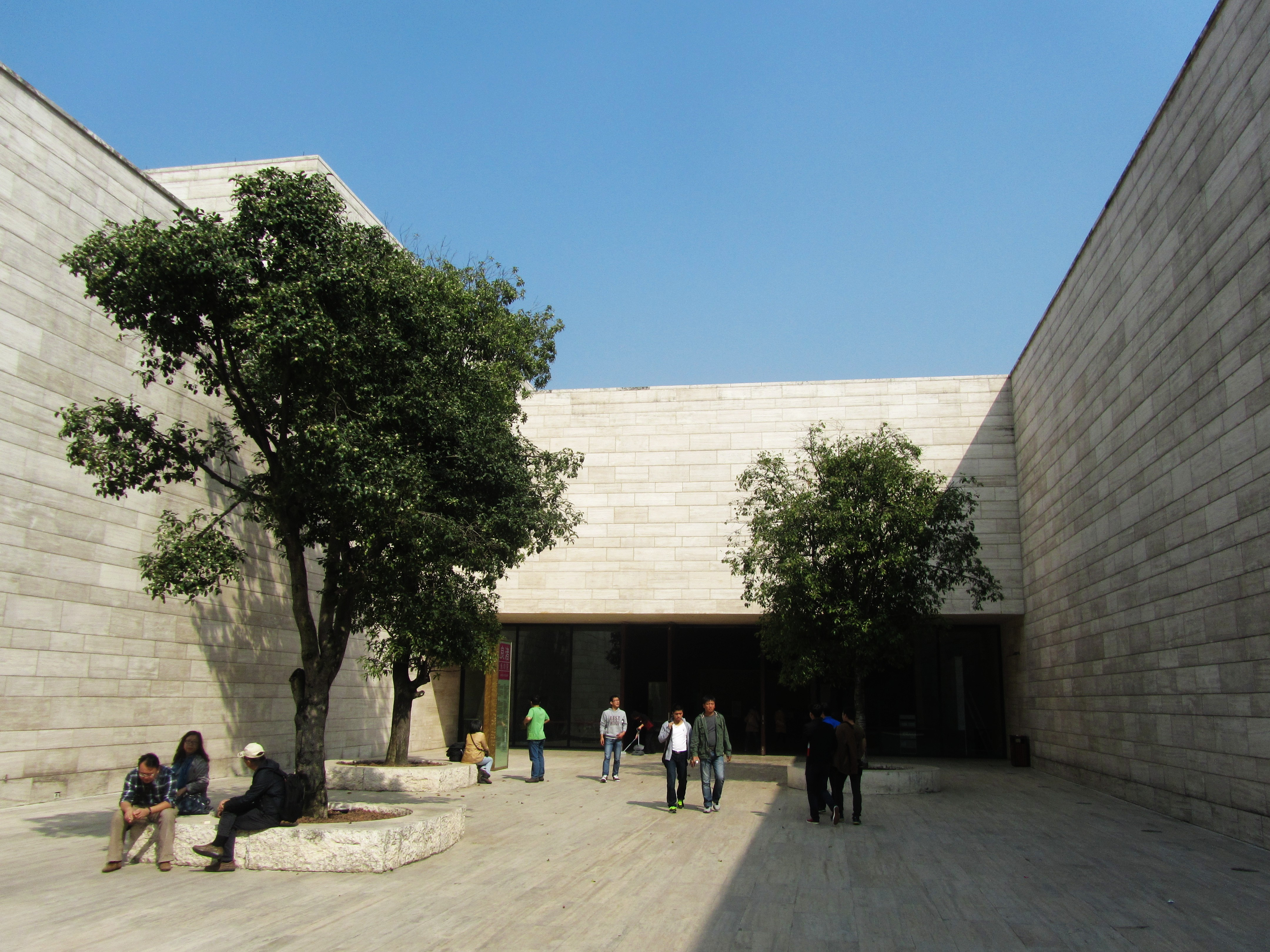 良渚博物院，大厅前的庭院。